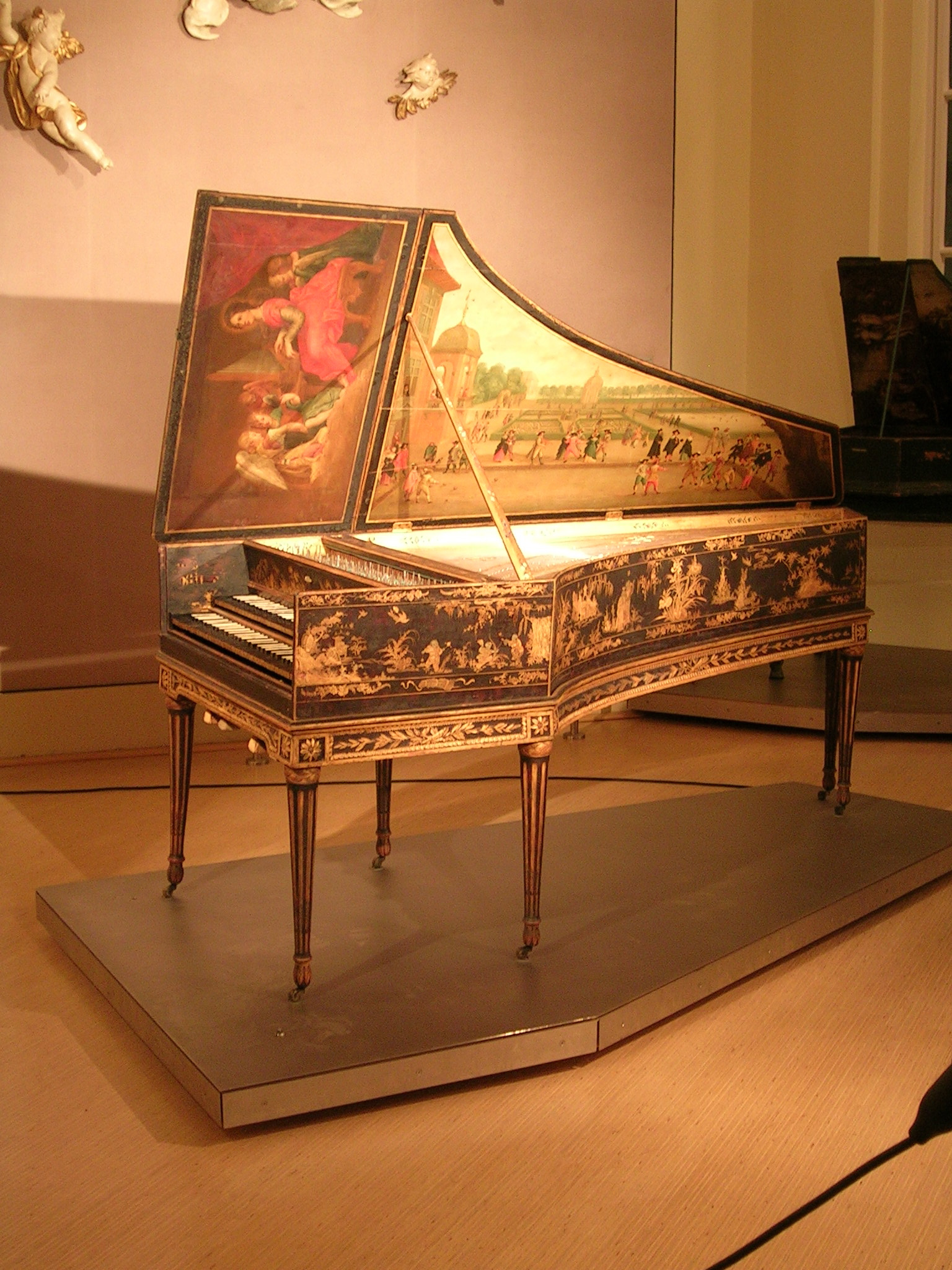 Taskin harpsichord (1788), Museum für Kunst und Gewerbe, Hamburg